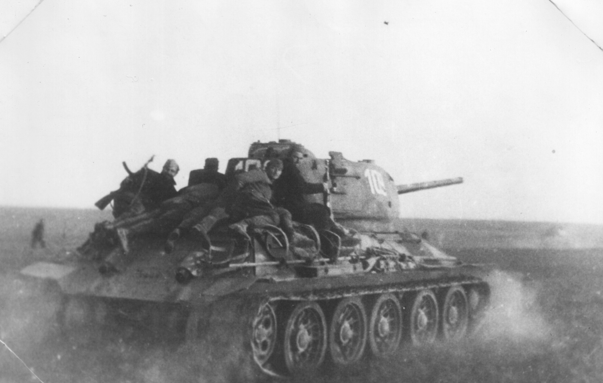 Srpskohrvatski / српскохрватски: Tenkovsko odeljenje 21. divizije u borbama za proboj Sremskog fronta 12. aprila 1945.